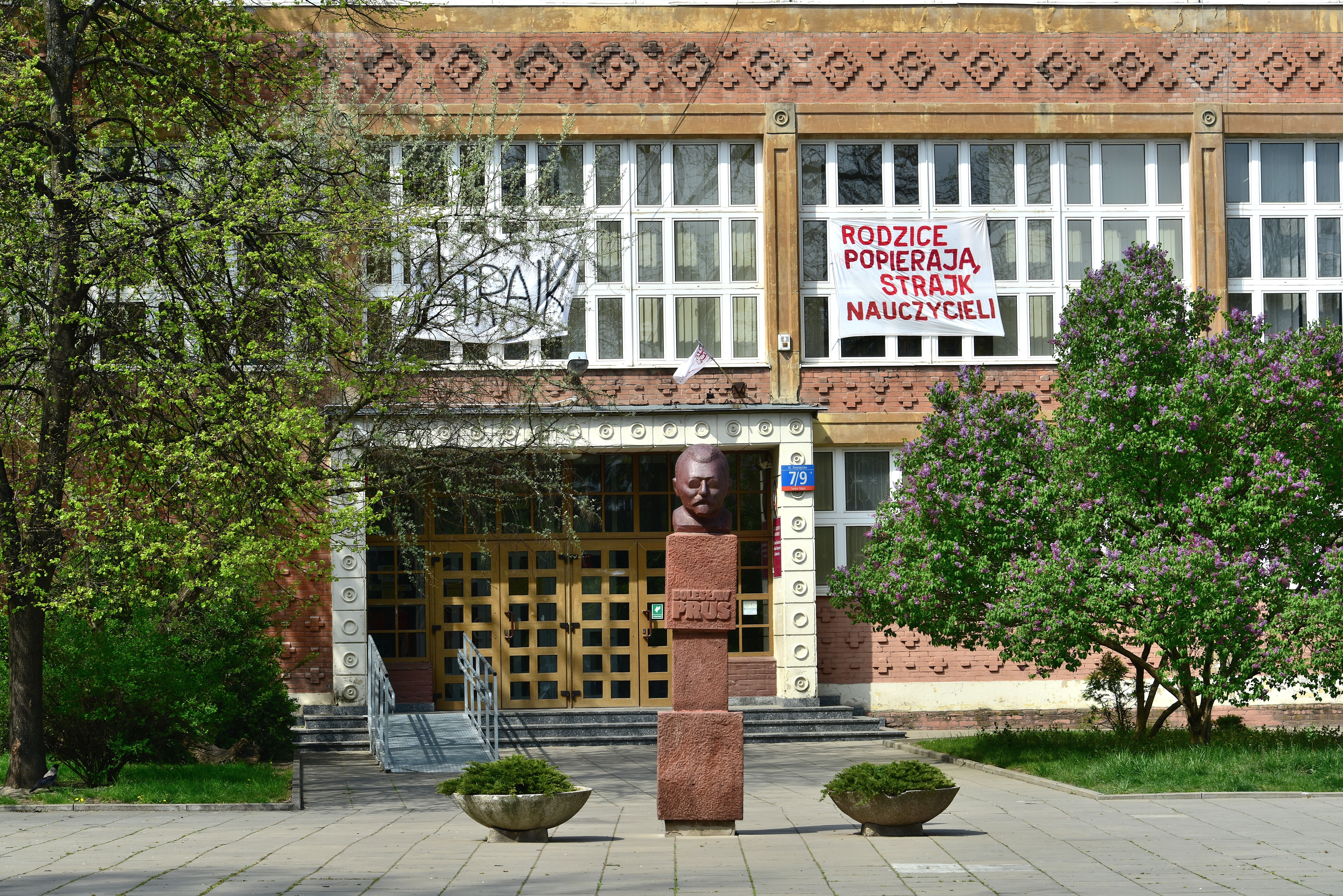 XXXV Liceum Ogólnokształcące im. Bolesława Prusa w Warszawie